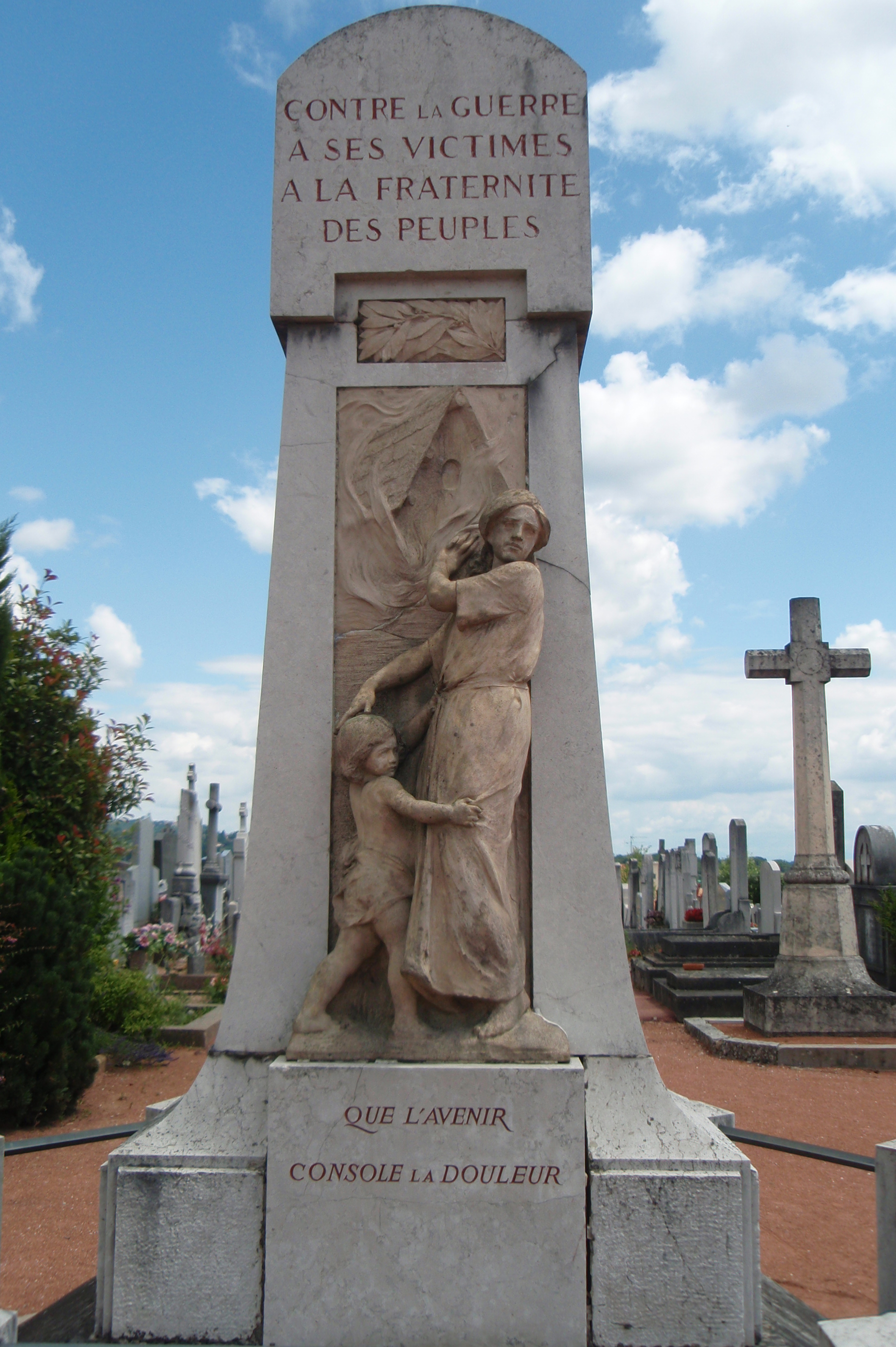 Monument aux morts commémoratif de la guerre 1914-1918 dans la commune de Dardilly.